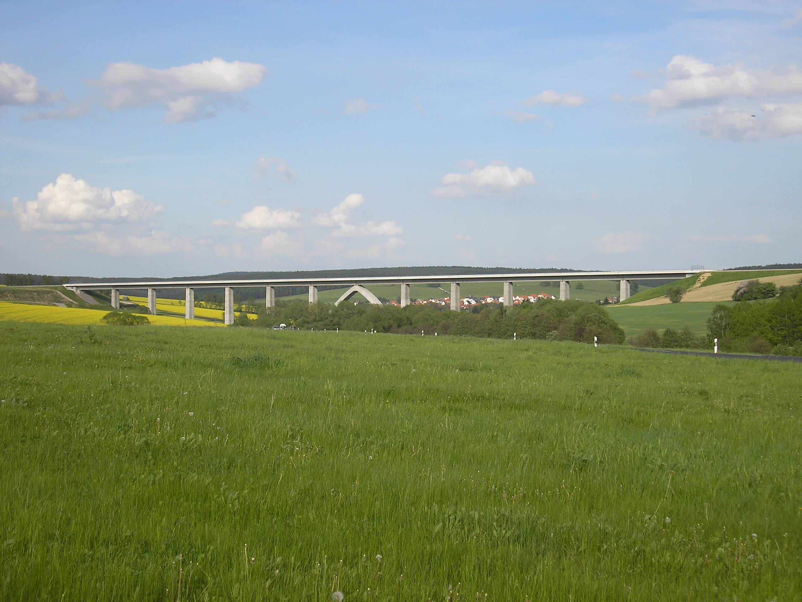 Die Wümbachtalbrücke bei Ilmenau (Thüringen).